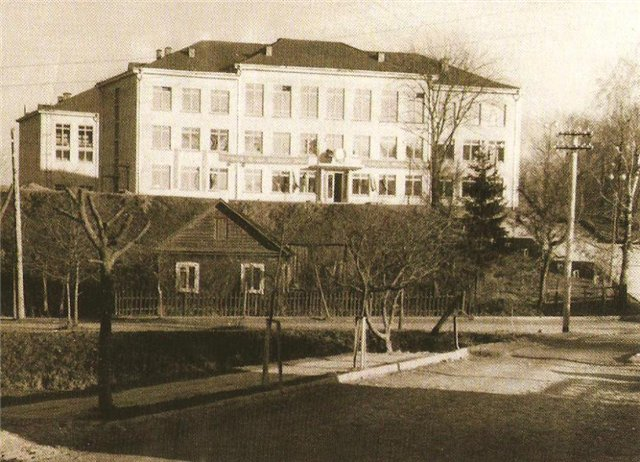 Utenos I-oji vidurinė mokykla, vaizdas iš dabartinės K.Ladygos g.